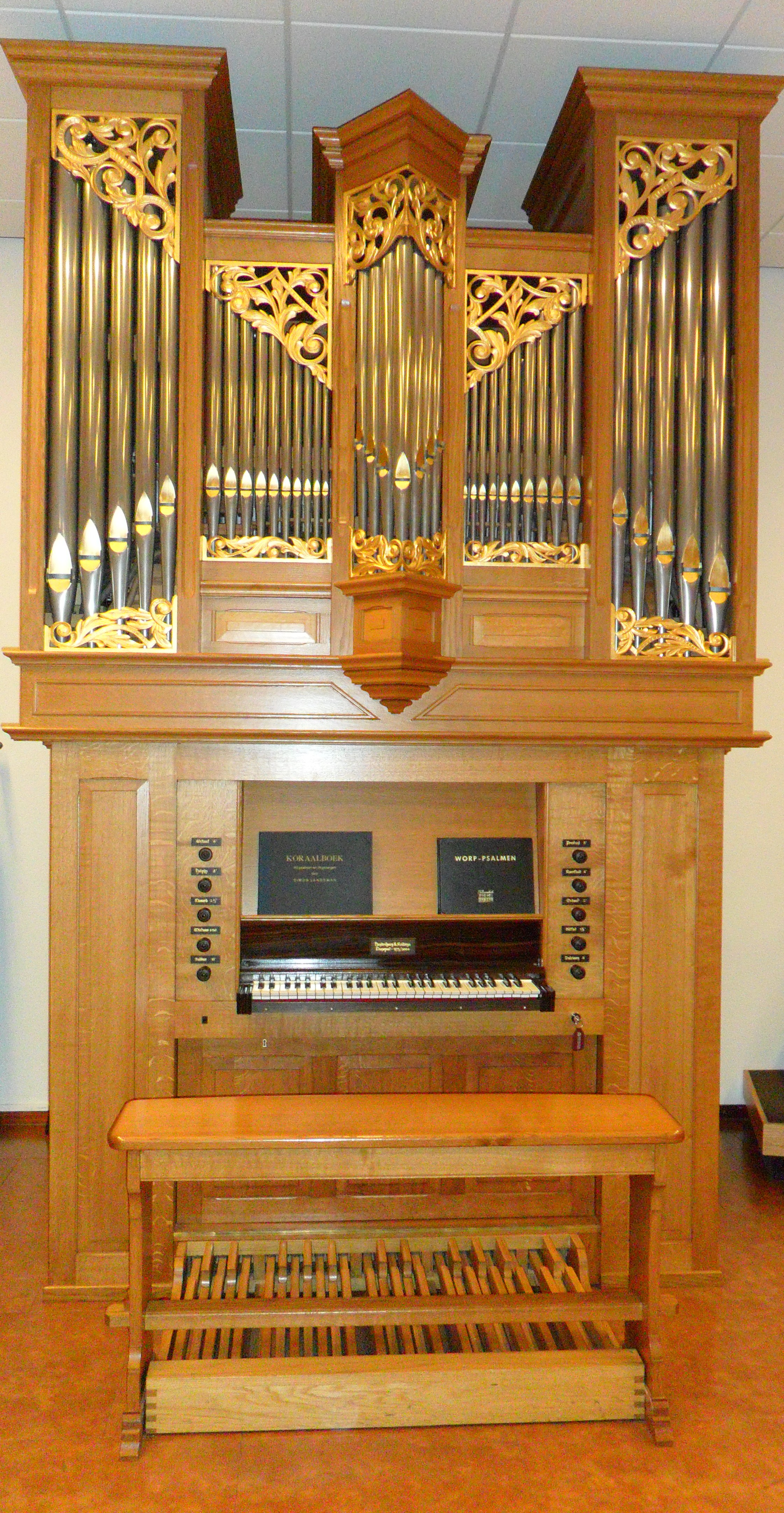 Het koororgel van de Ger. Gem. Genemuiden